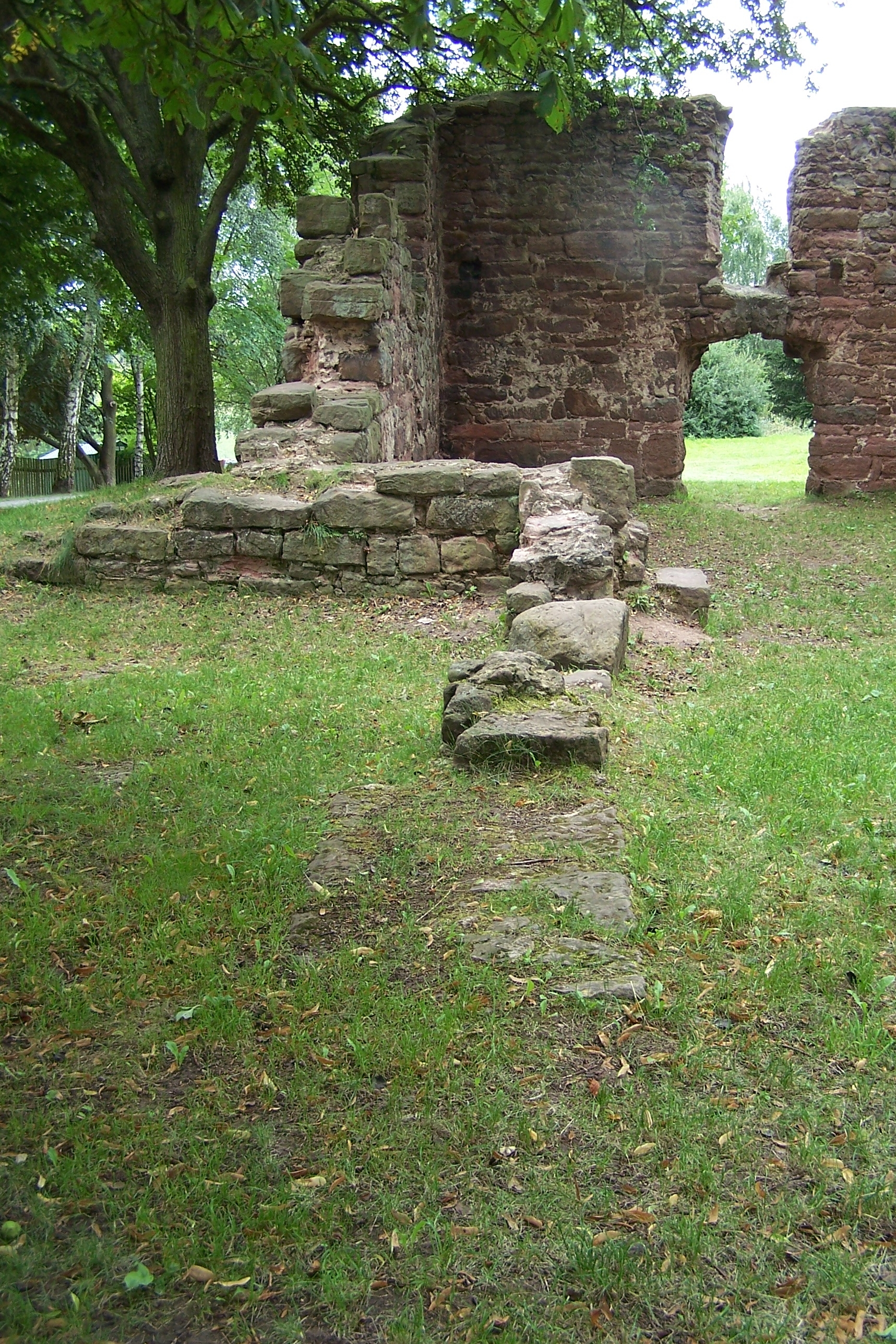 Ansichten und Details zur Ruine St. Annen in Vacha.